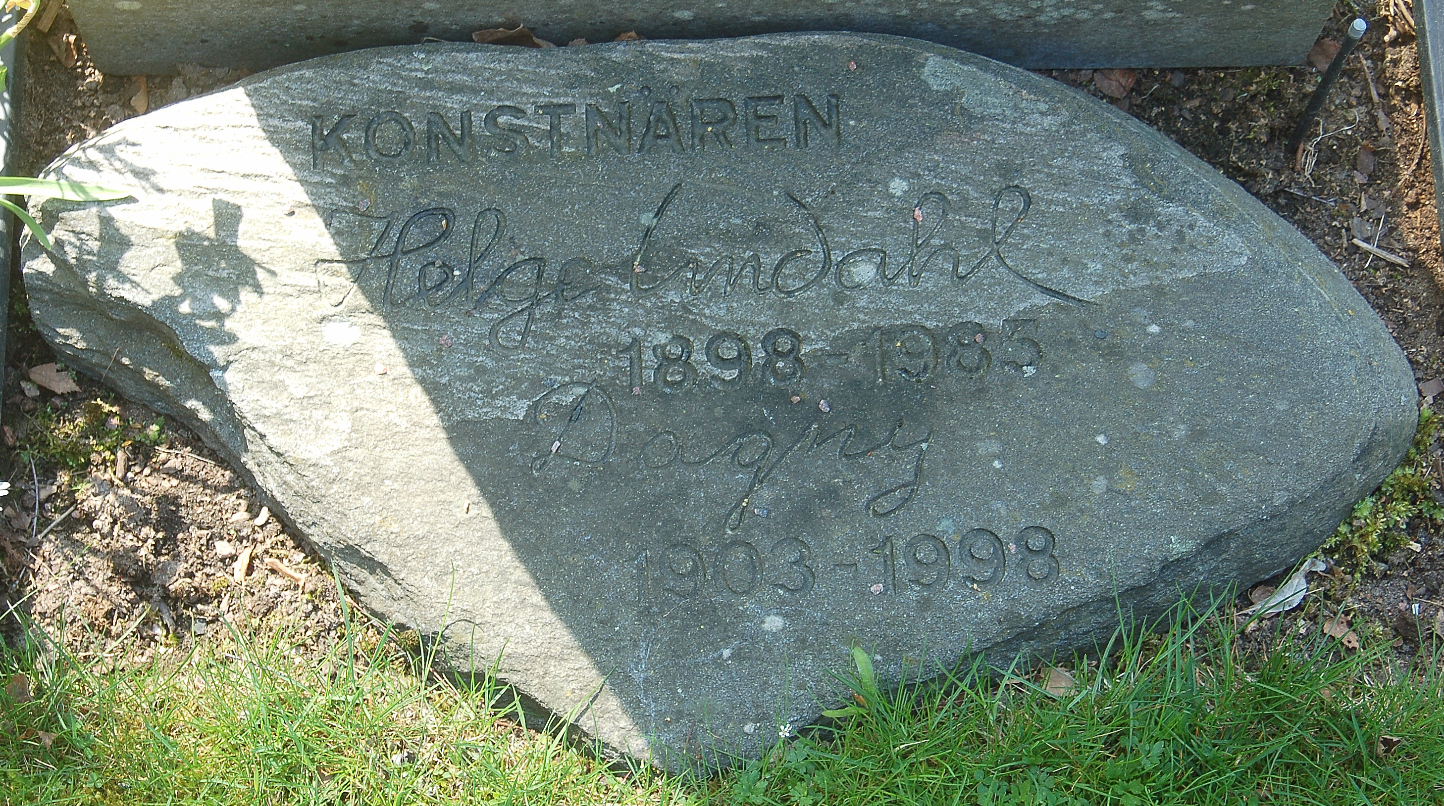 Minnesvård för Helge Lindahl 1898-1985 vid Hammarö kyrkogård